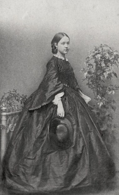 Наталья Сергеевна Вельяминова, ур. Озерова (1841—1864)